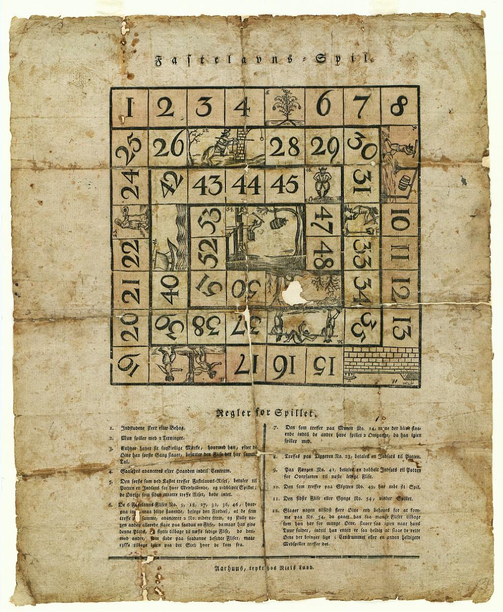 Fastelavns = Spil